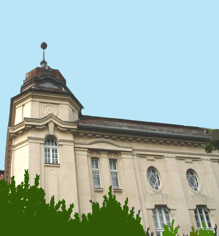 glavna zgrada slovačke gimnazije u Bačkom Petrovcu